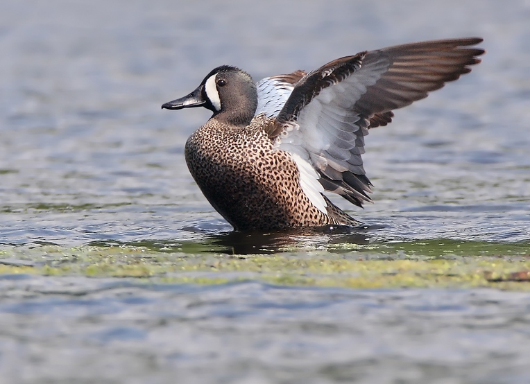 Anas discors